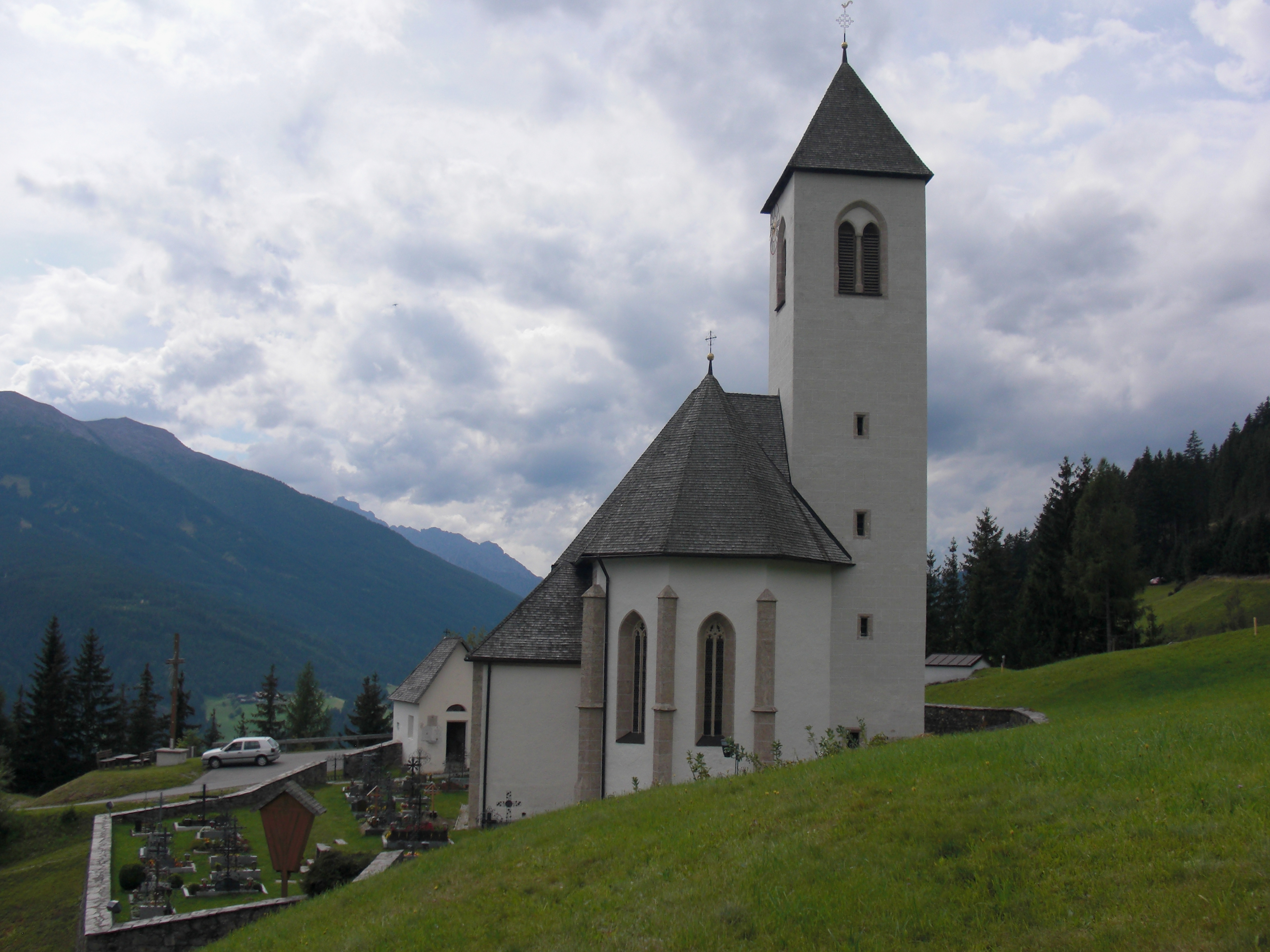 Kath. Pfarrkirche Hll. Johannes d. T. und Ev. in Tassenberg (Ortsteil von Heinfels in Osttirol, Österreich).